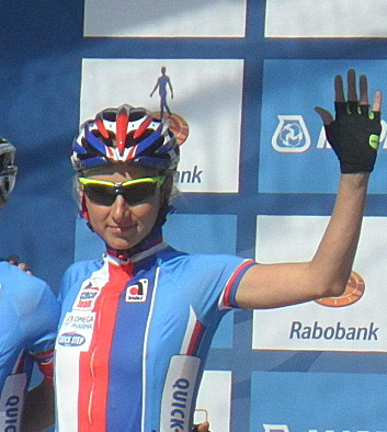 Ploegenpresentatie Tsjechië voor de start van het Wereldkampioenschap 2012 in Valkenburg, Nederland.